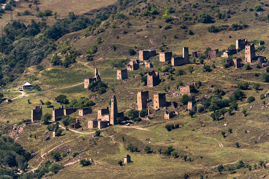 Башни в древнем ингушском городе Эгикхал (Джейрахский район, Ингушетия)